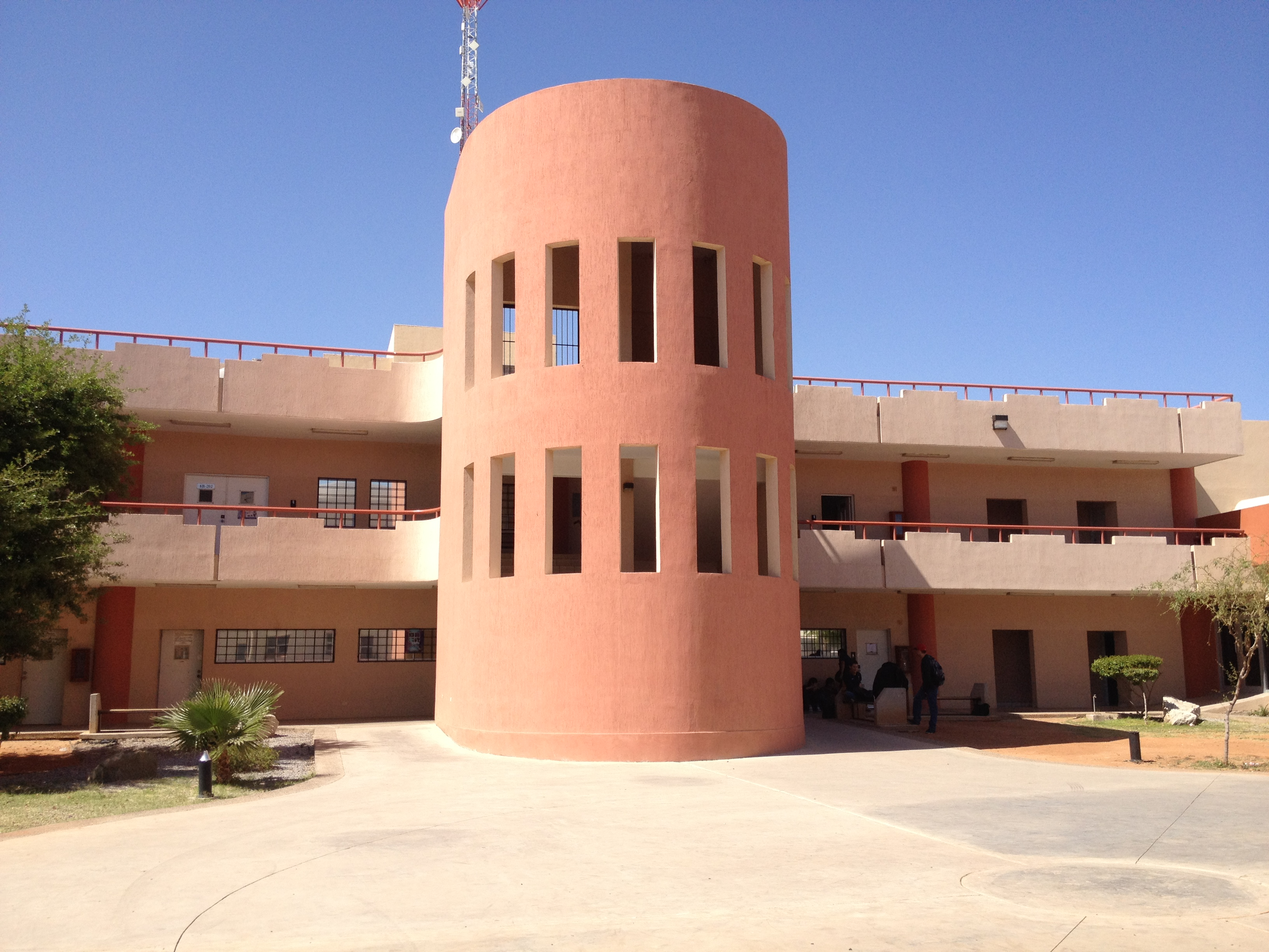 Edificio 8B de la Universidad de Sonora. "Electrónica".